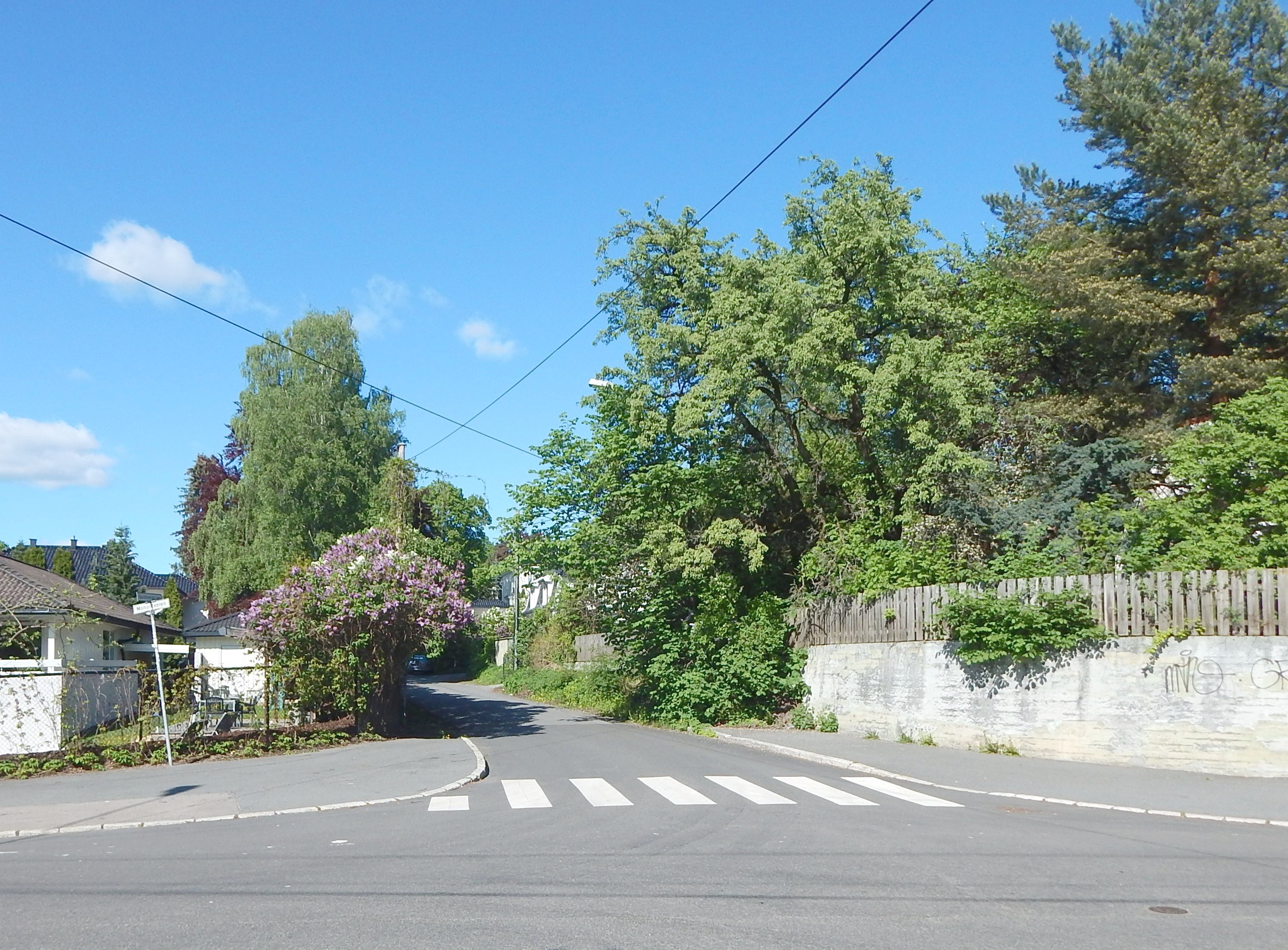 Guldbergs vei nordøstover fra Monolitveien